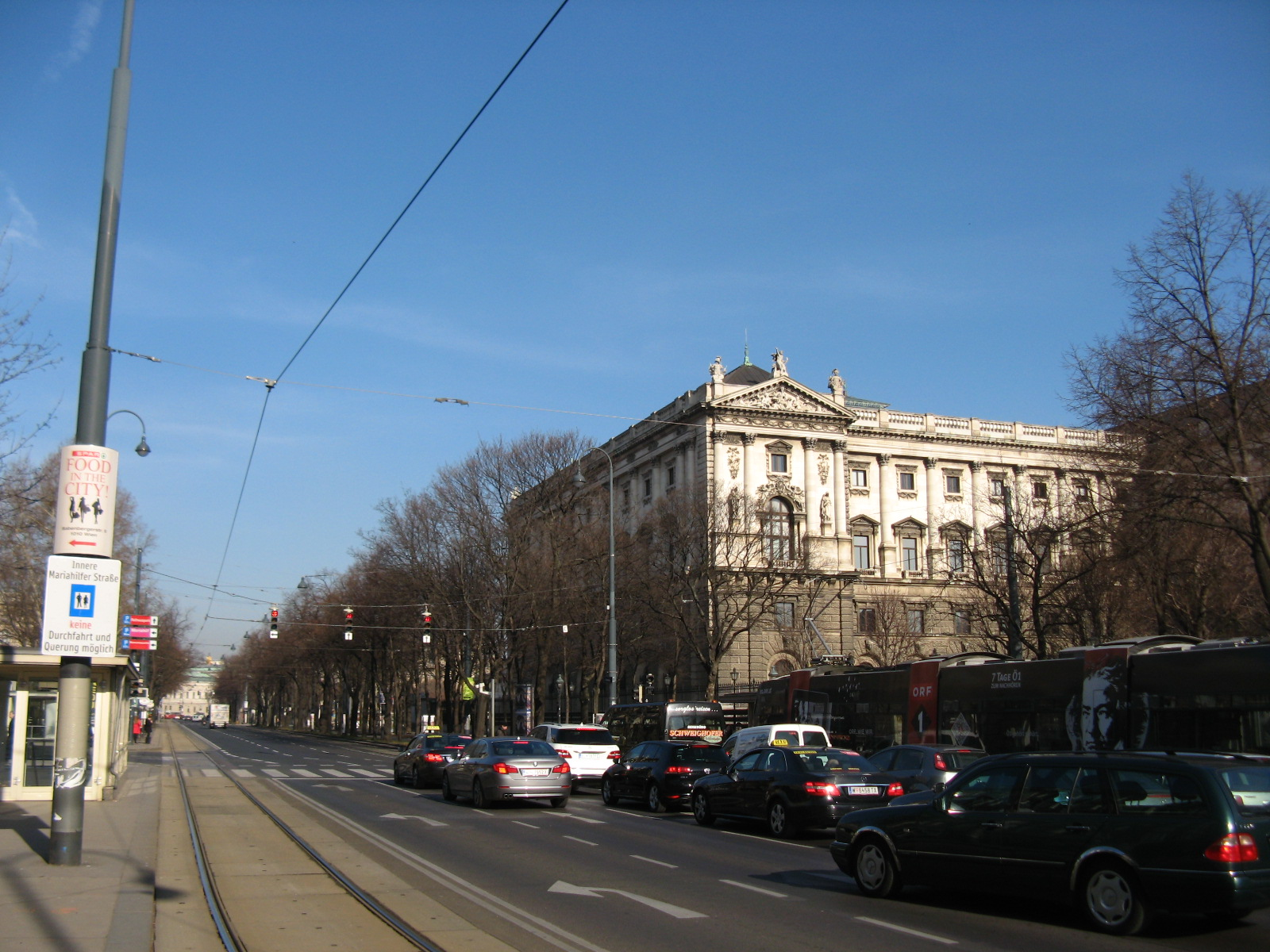 Burgring, Wien-Innere Stadt